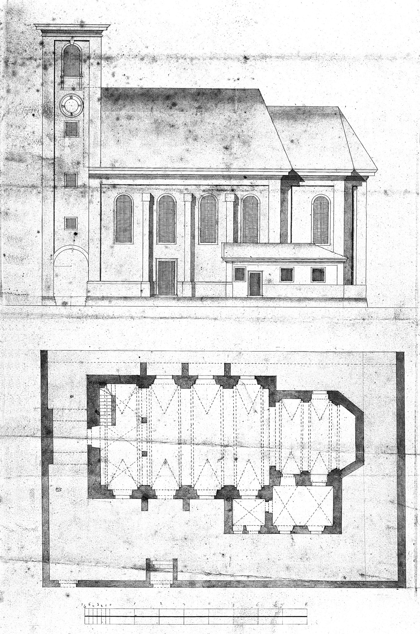 Ansicht (Südseite) und Grundriss der ehemaligen Nikolauskirche in Urfahr (auch Nikolaikirche). Die Kirche wurde 1789 profaniert und zuerst als Getreideschüttkasten und ab 1824 als Wohnhaus genutzt. Das Gebäude wurde 1975 für den Bau des Neuen Linzer Rathauses abgerissen.